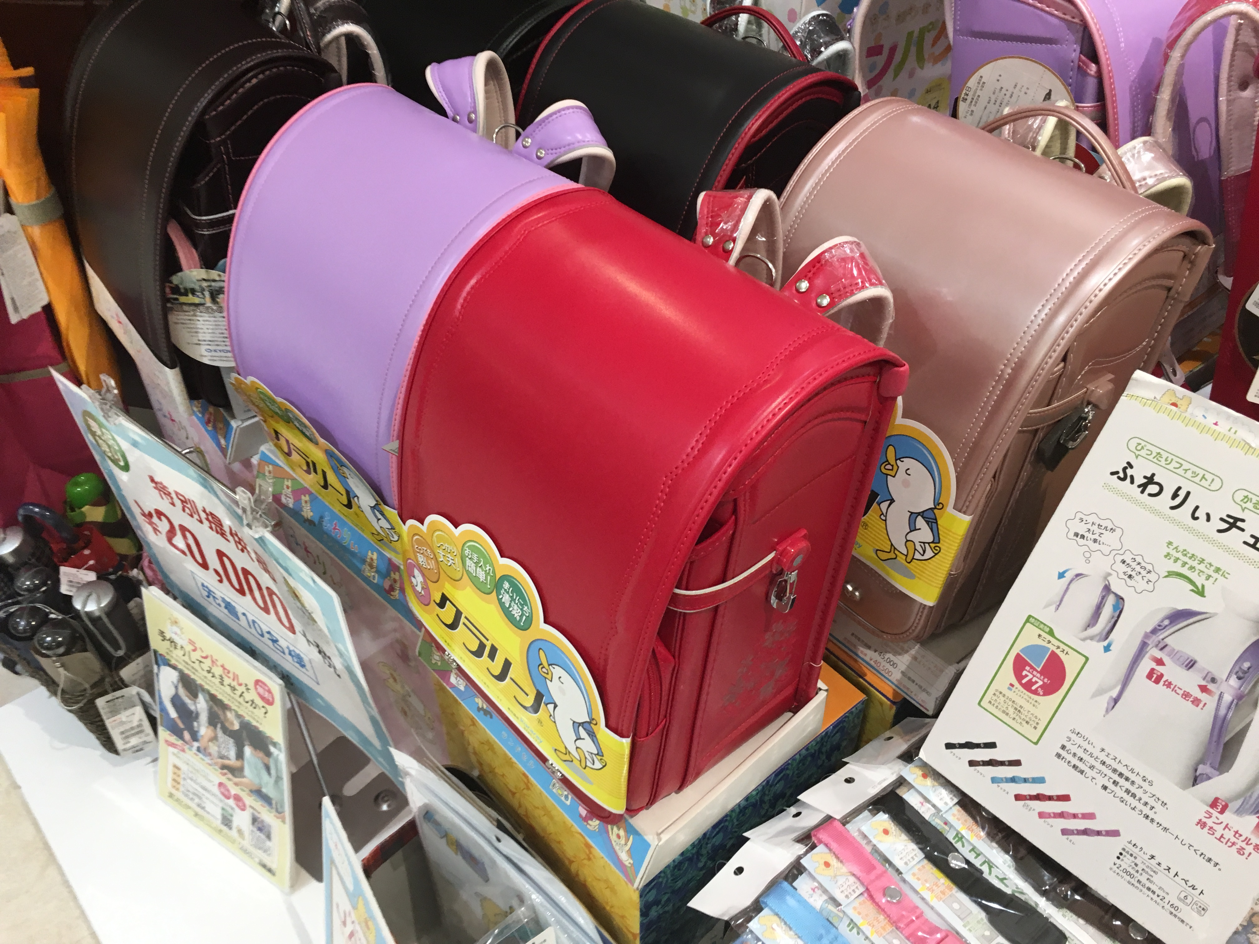 ランドセル (randoseru)